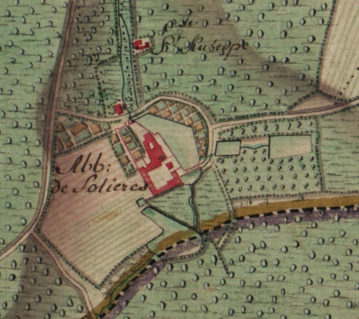 Extrait de la carte de Ferraris n° 154A